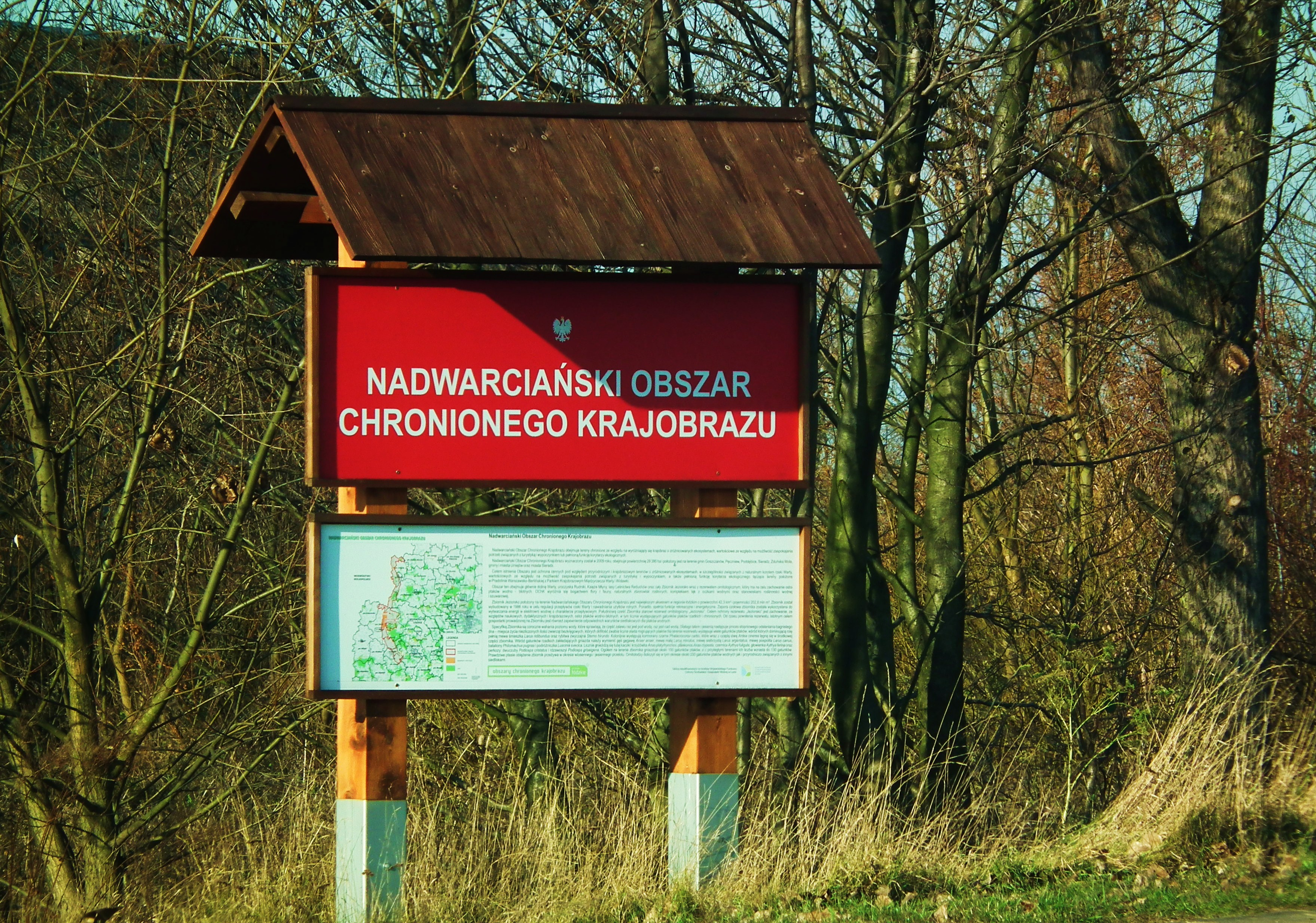 Nadwarciański Obszar Chronionego Krajobrazu w okolicy Wilamowa.